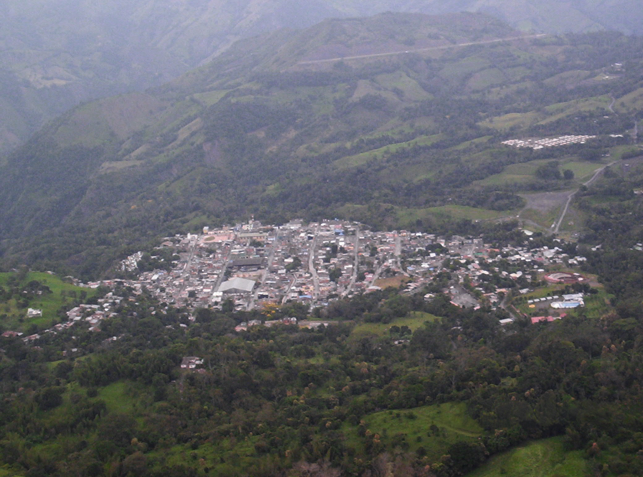 Panoramica de Muzo